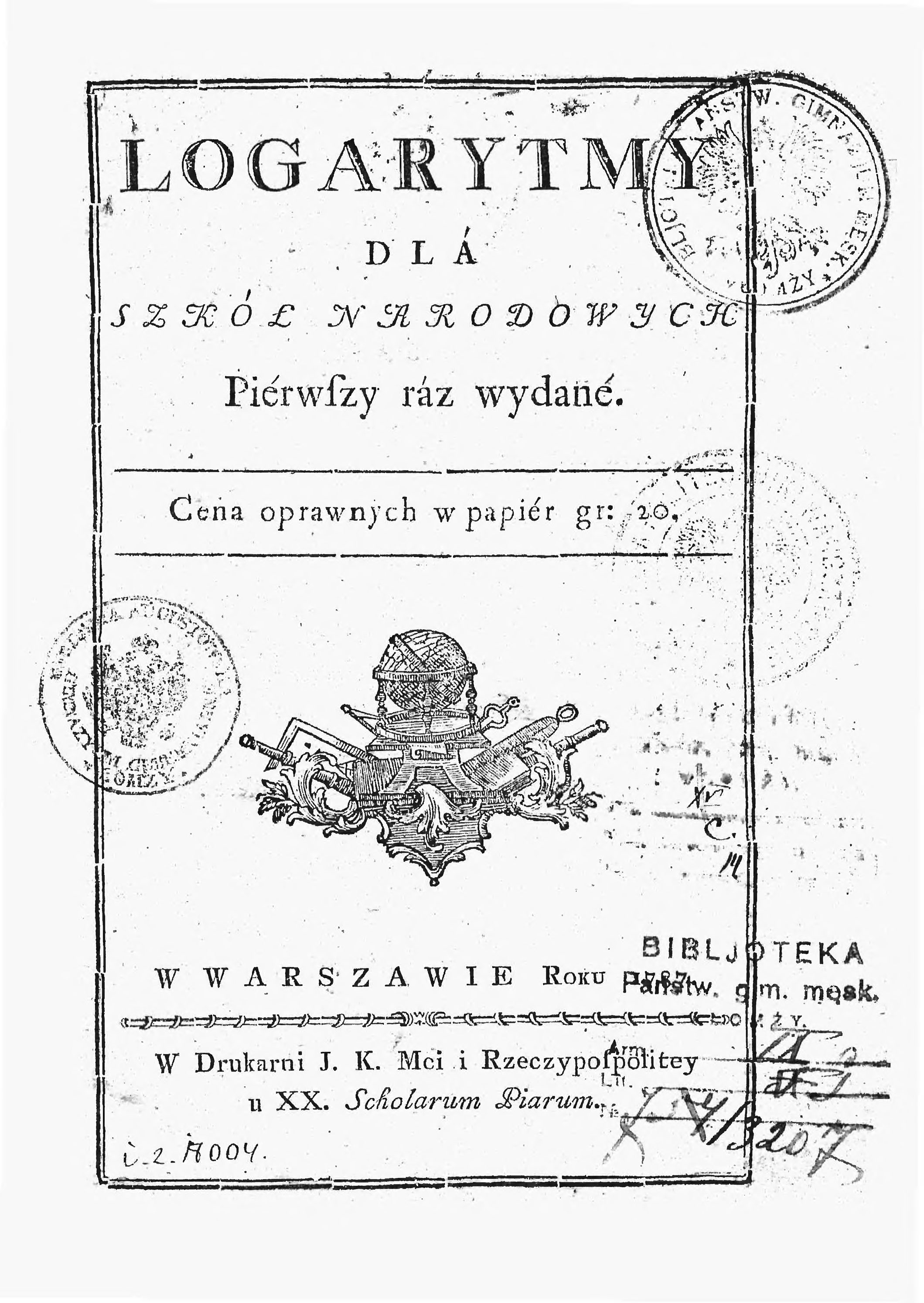 Book cover of Ignacy Zaborowski, Logarytmy dlá szkół narodowych, 1787.